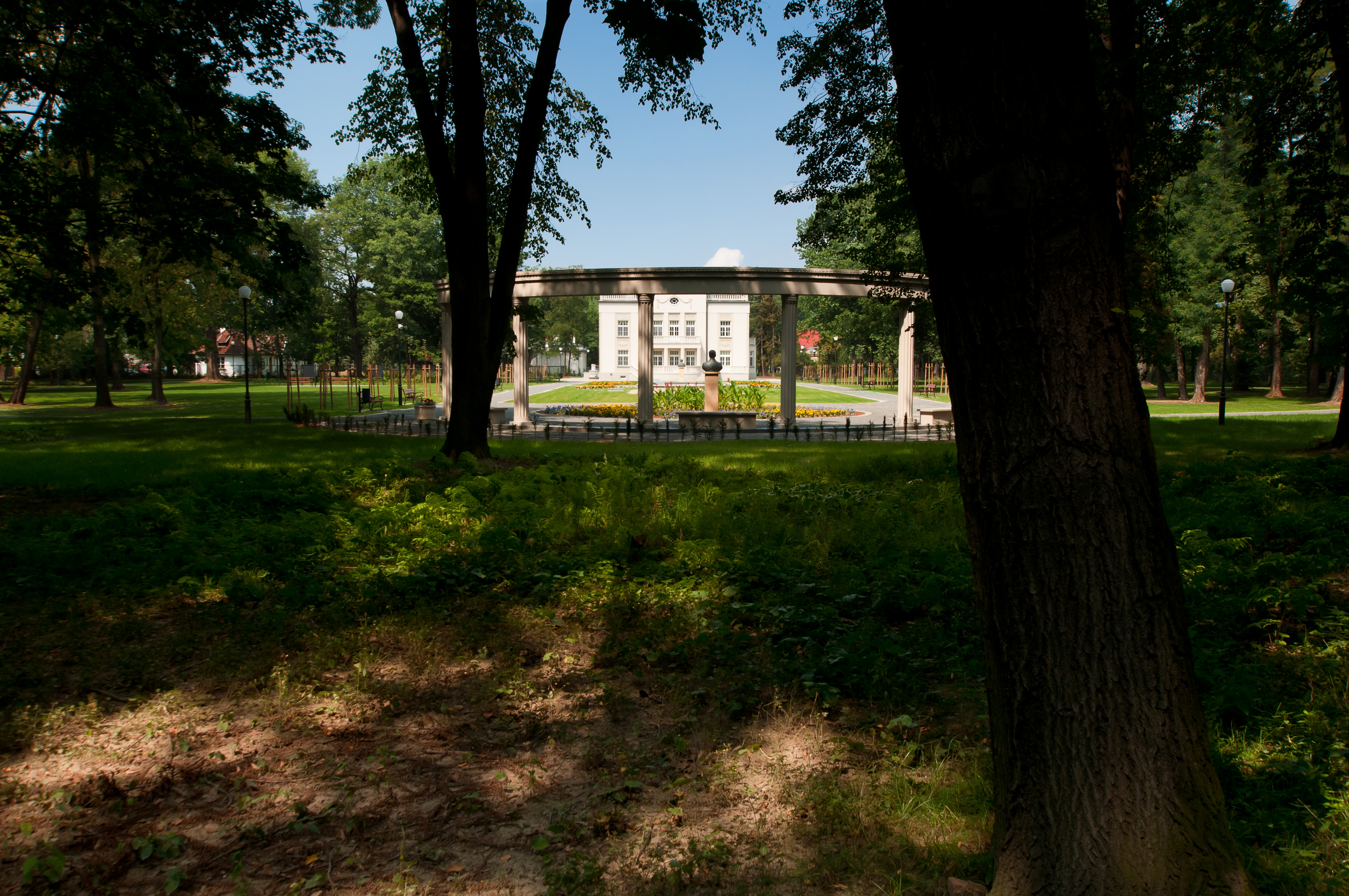 Tarnów, ul. Jarzębinowa 9 - zespół willowy: widok na Pałacyk Kwiatkowskiego (willę) od strony południowej. Pałacyk w otoczeniu Parku im. E. Kwiatkowskiego (zabytek nr A-63/M z 21.07.2006)